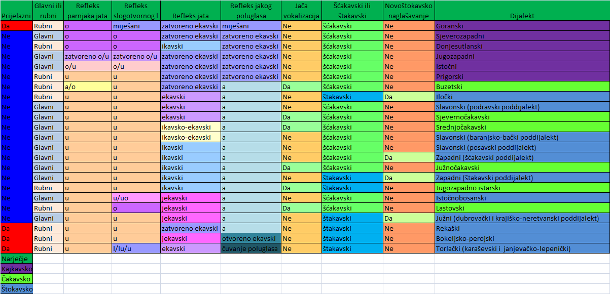 Kategorizacija. hr. dijalekata